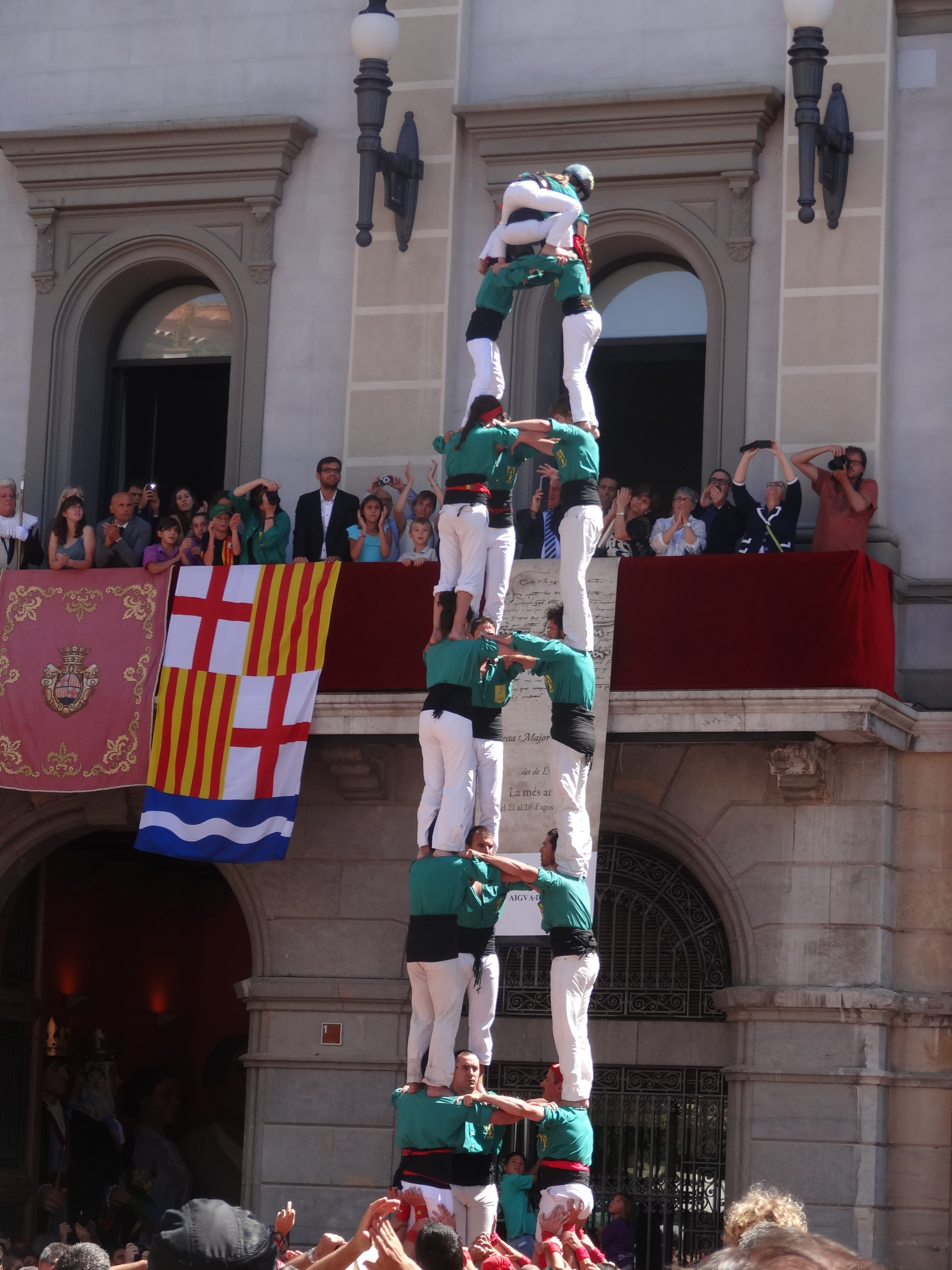 Actuació castellera de la Festa Major Major d'Igualada 2013, a la plaça de l'ajuntament. Castellers de Sabadell 3de8 descarregat